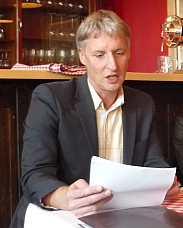 Helge Lehmann bei der Pressekonferenz in Berlin zur Neuaufnahme des TEV